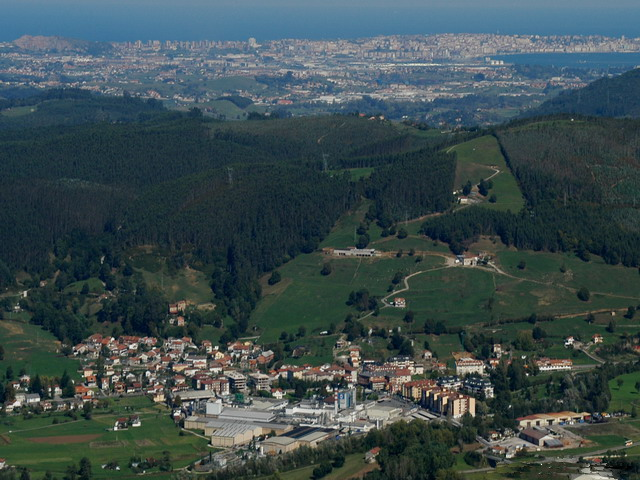 La Penilla con Santander al fondo © jlgomezlinares